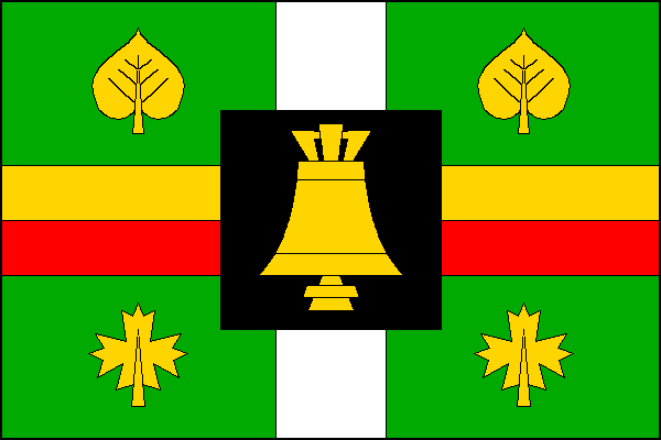 vlajka, Lesonice, okres Znojmo